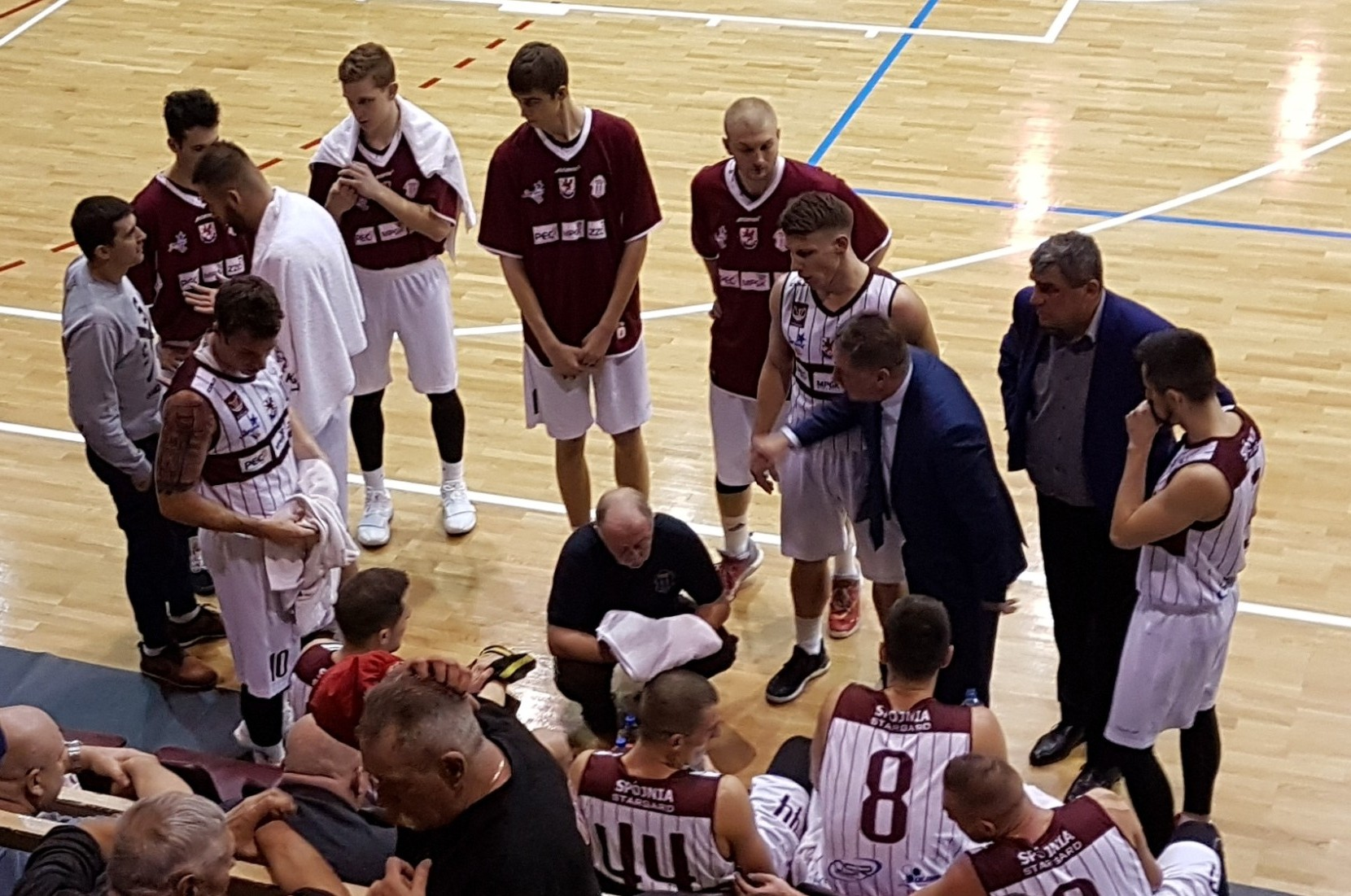 Stargard, 25.11.2017. Trenerzy Spójni Koziorowicz i Purwiniecki